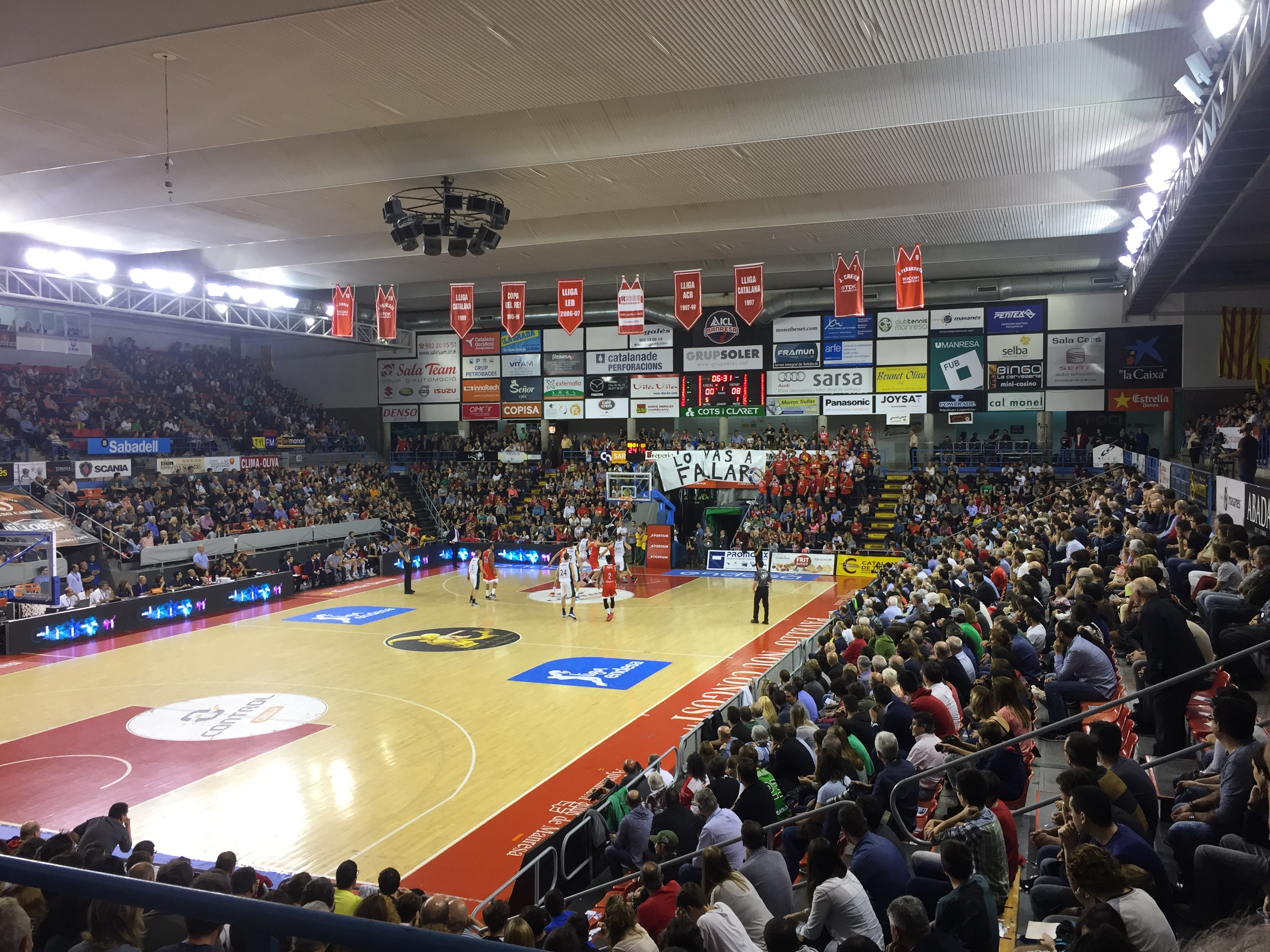 Partit de lliga ACB entre el Divina Seguros Joventut i l'ICL Manresa, temporada 2016-17.